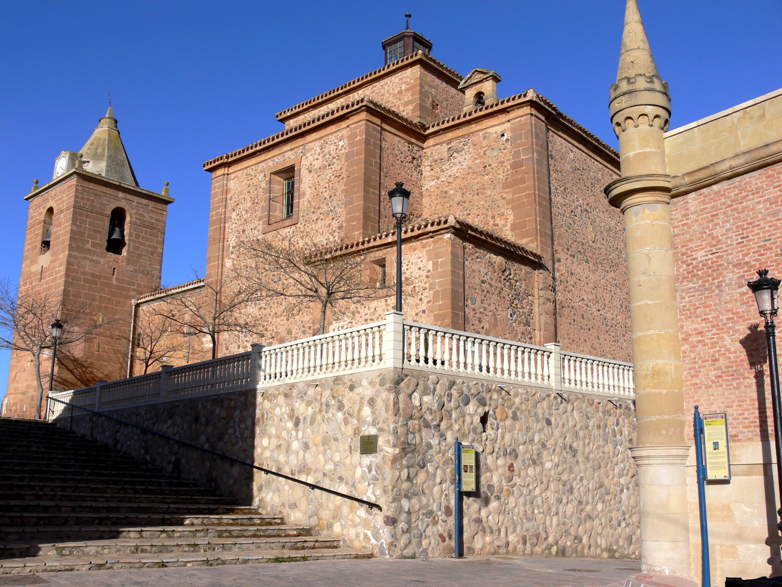 Iglesia de San Martín en Canillas de Río Tuerto (La Rioja - España).